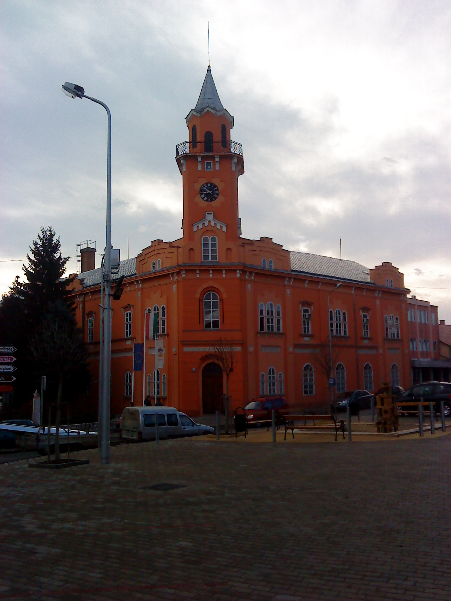 Siklósi polgármesteri hivatal